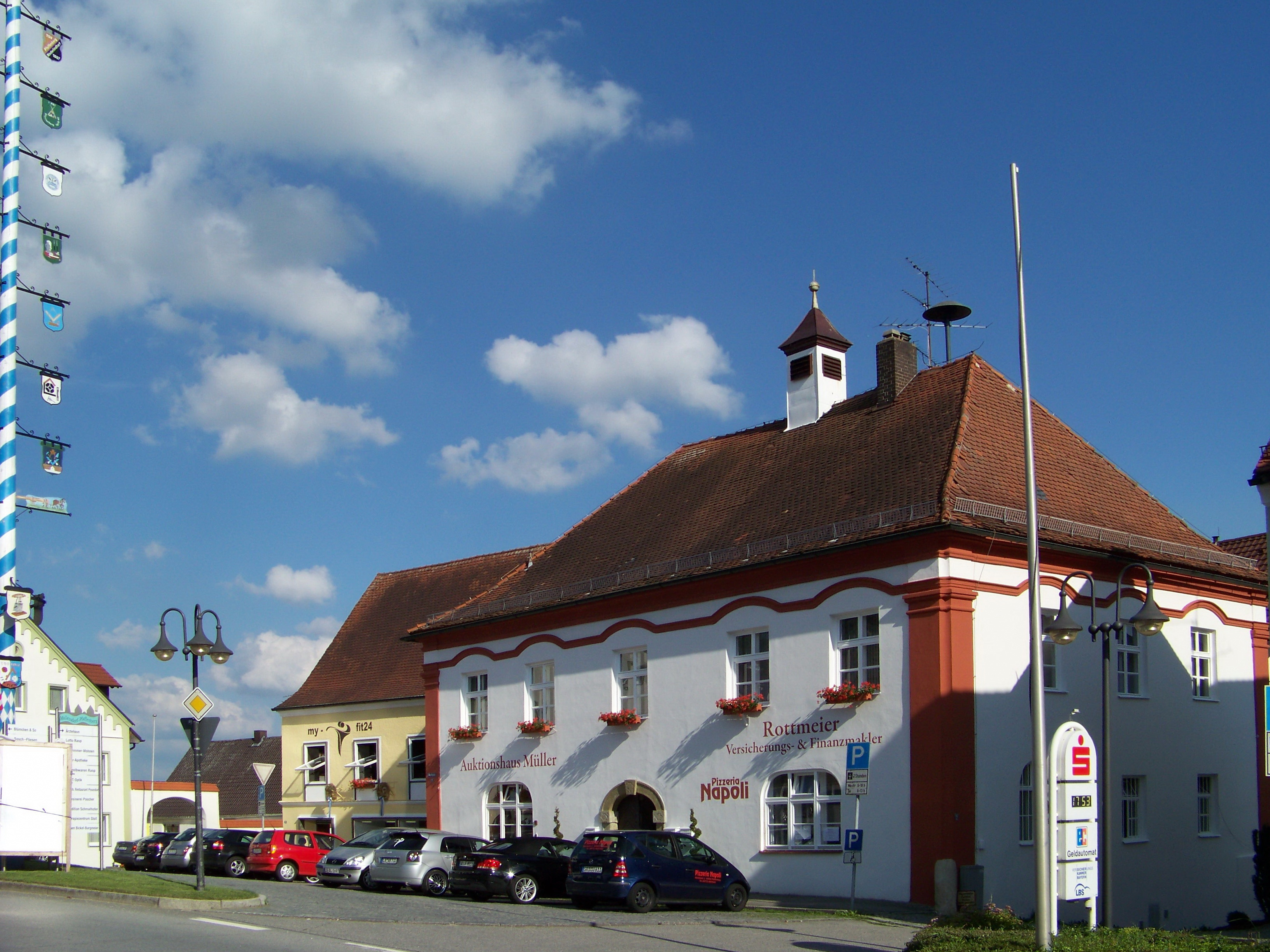 Mallersdorf-Pfaffenberg. Ehemaliges Rathaus, Walmdachbau mit Eckpilastern, Schweifgesims und Portal, 1735/38.